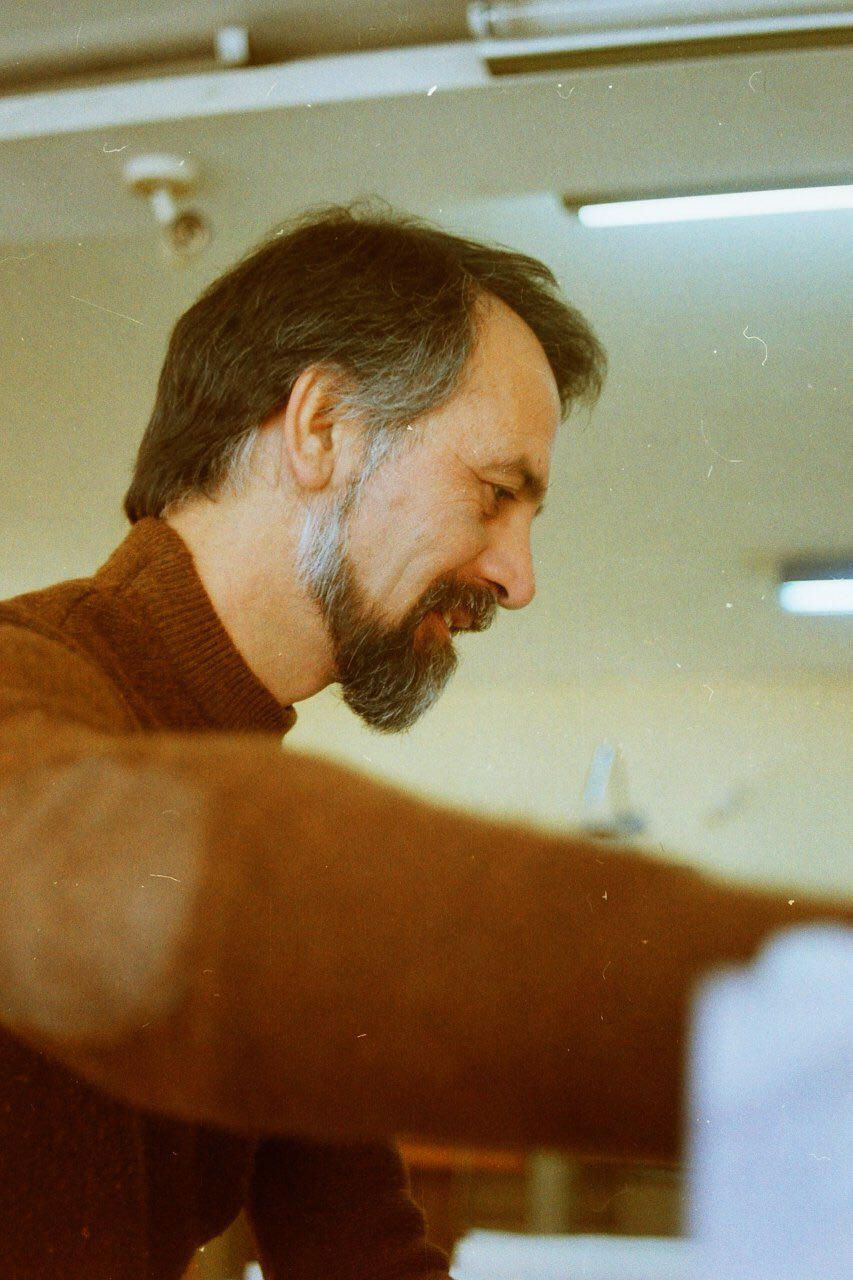 این عکس متعلق به آتلیه شارستان است